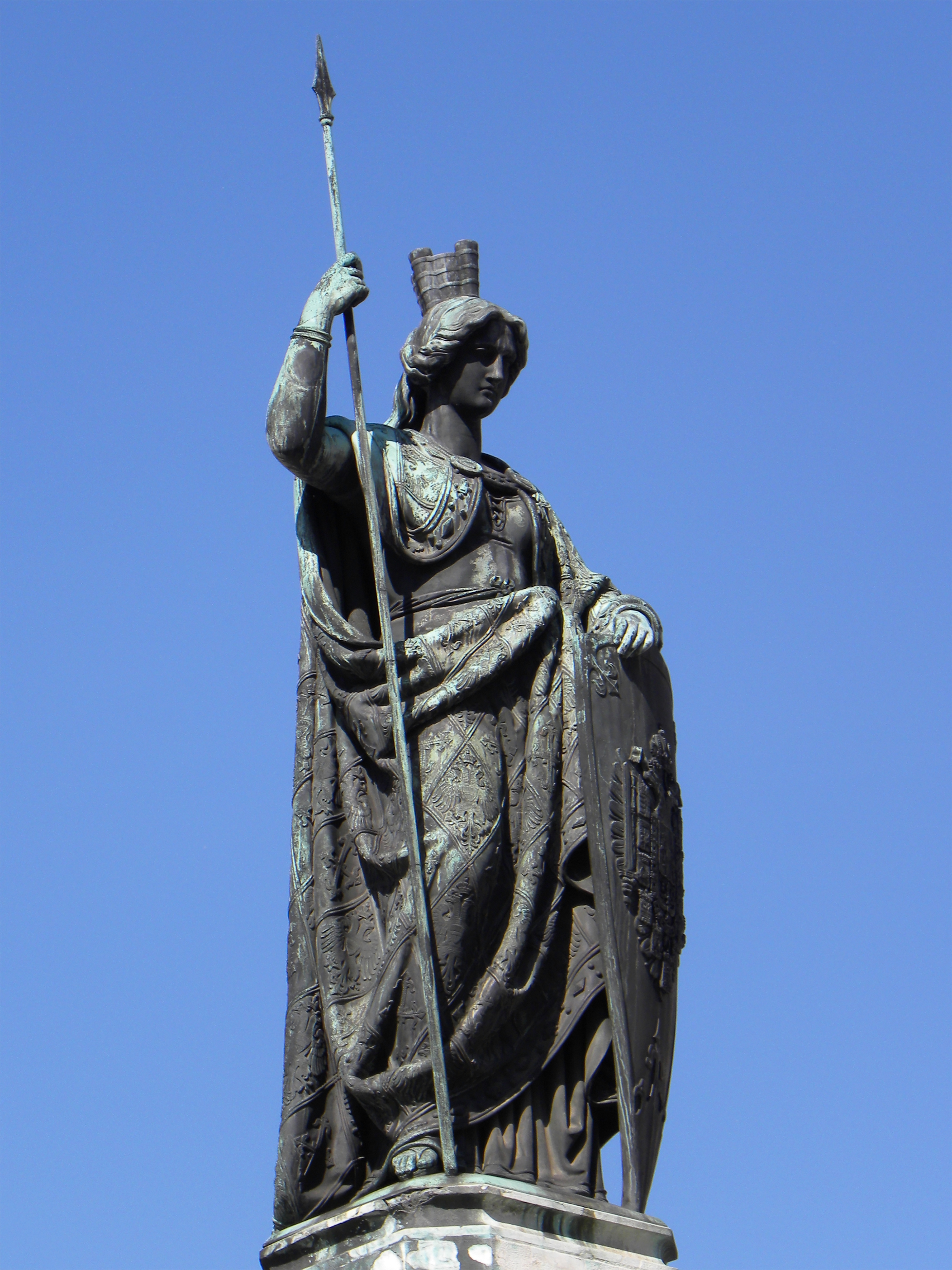 Austriabrunnen, Ludwig Michael von Schwanthaler